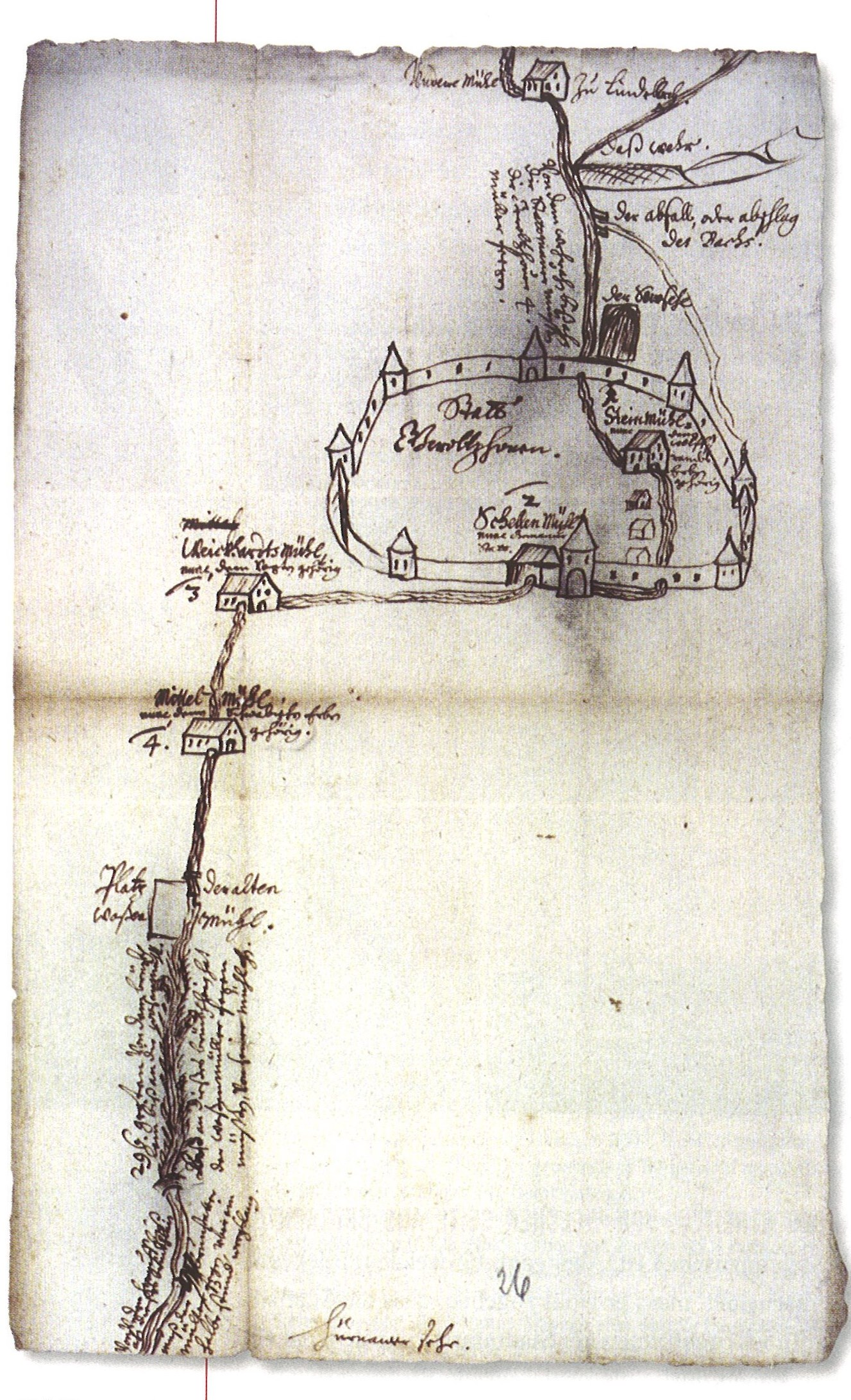 Die Mühlen an der Volkach zwischen Lindelach und Gerolzhofen. (von oben nach unten): Klesenmühle, Stadtmauer Gerolzhofen, Steinmühle, Schellenmühle, Vogtsmühle, Erlesmühle. Plan von 1590